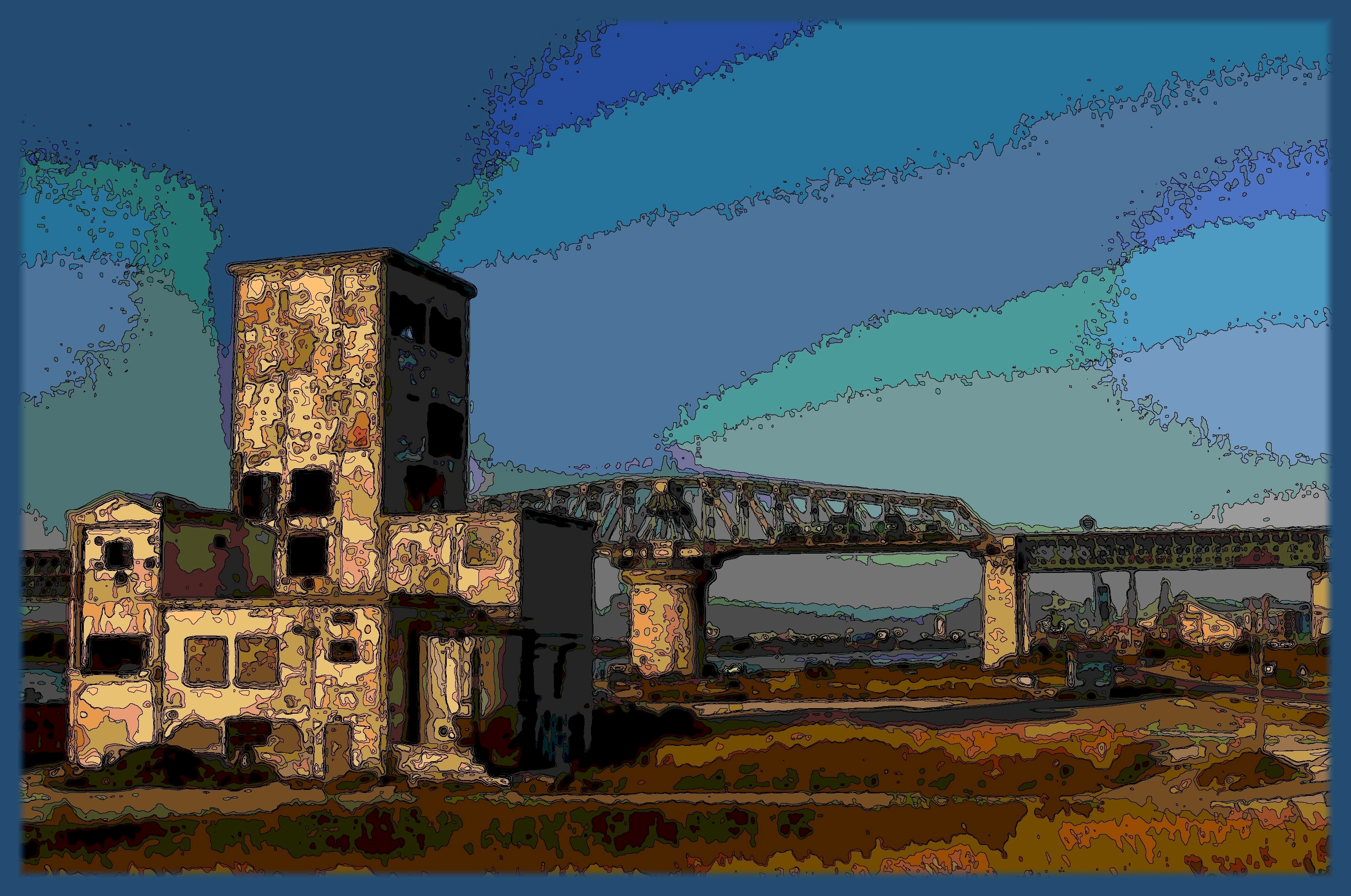 Mystère, disparition d'Anne de Lestrade dans le Rhône.